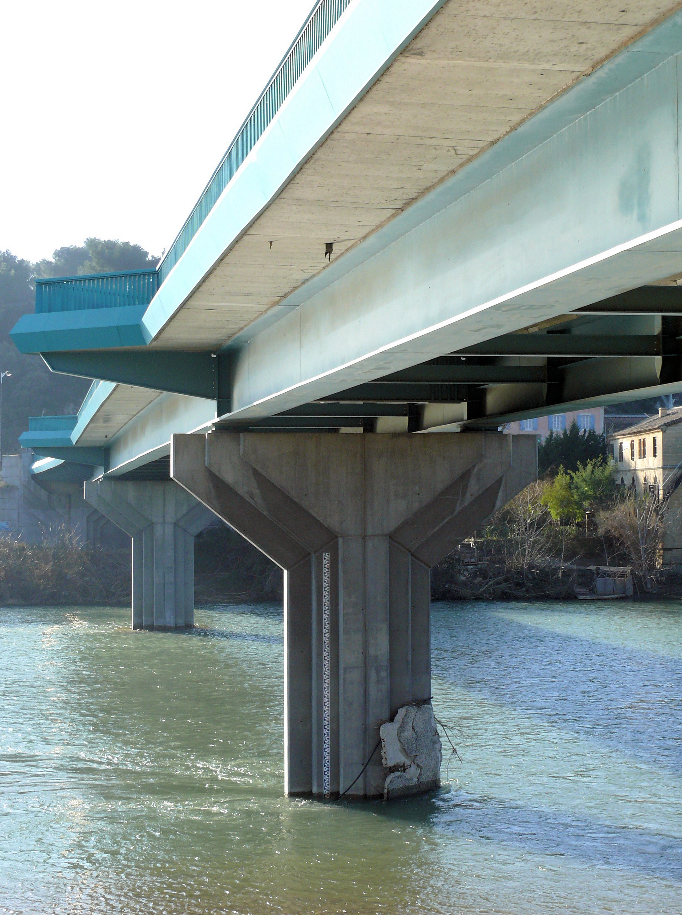 Remoulins - Pont sur le Gardon